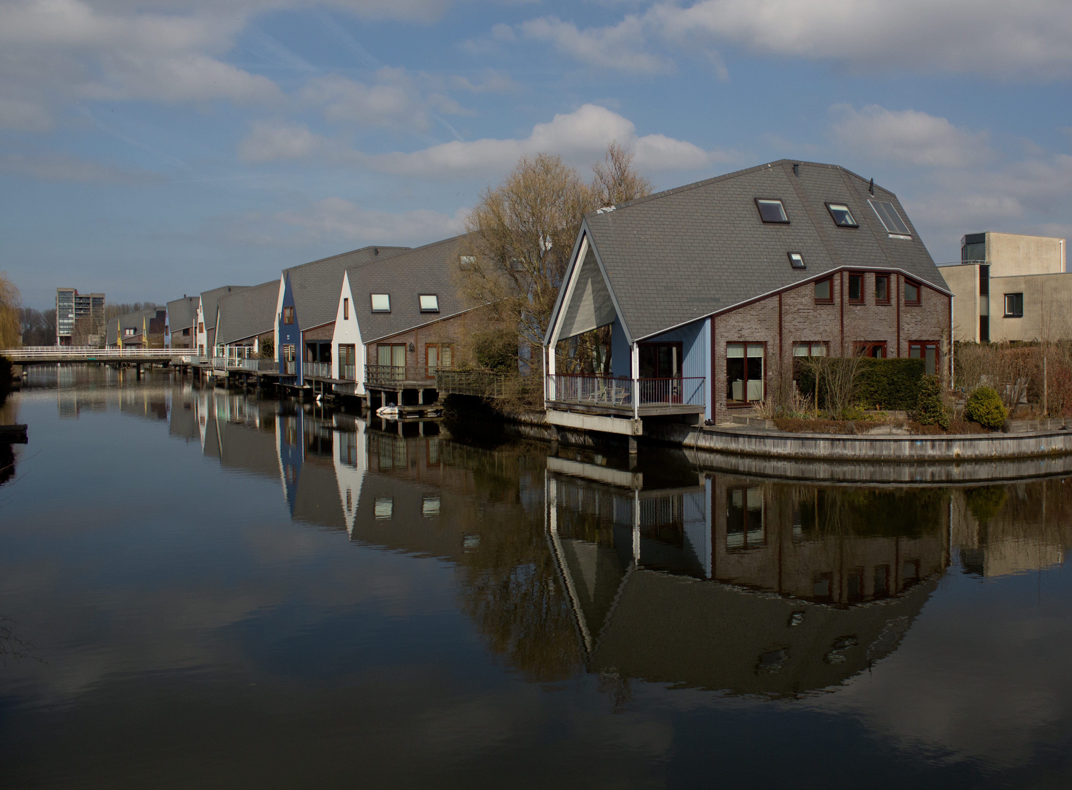 Almere Buiten, Eilandenbuurt, Ter hoogte van het Martiniquepad.